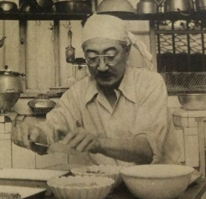 カジキの刺身を作る山本嘉次郎